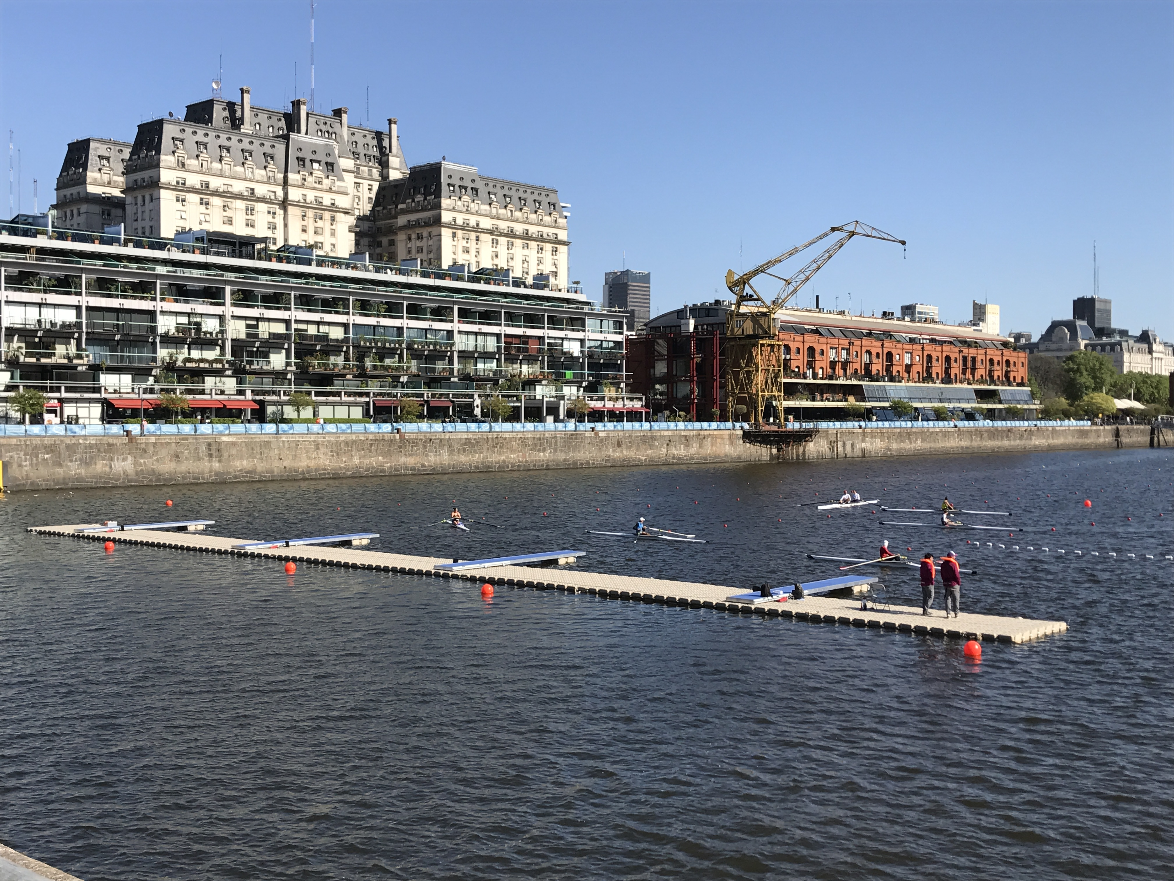 Ligne de départ de l’aviron lors des Jeux olympiques de la jeunesse de 2018